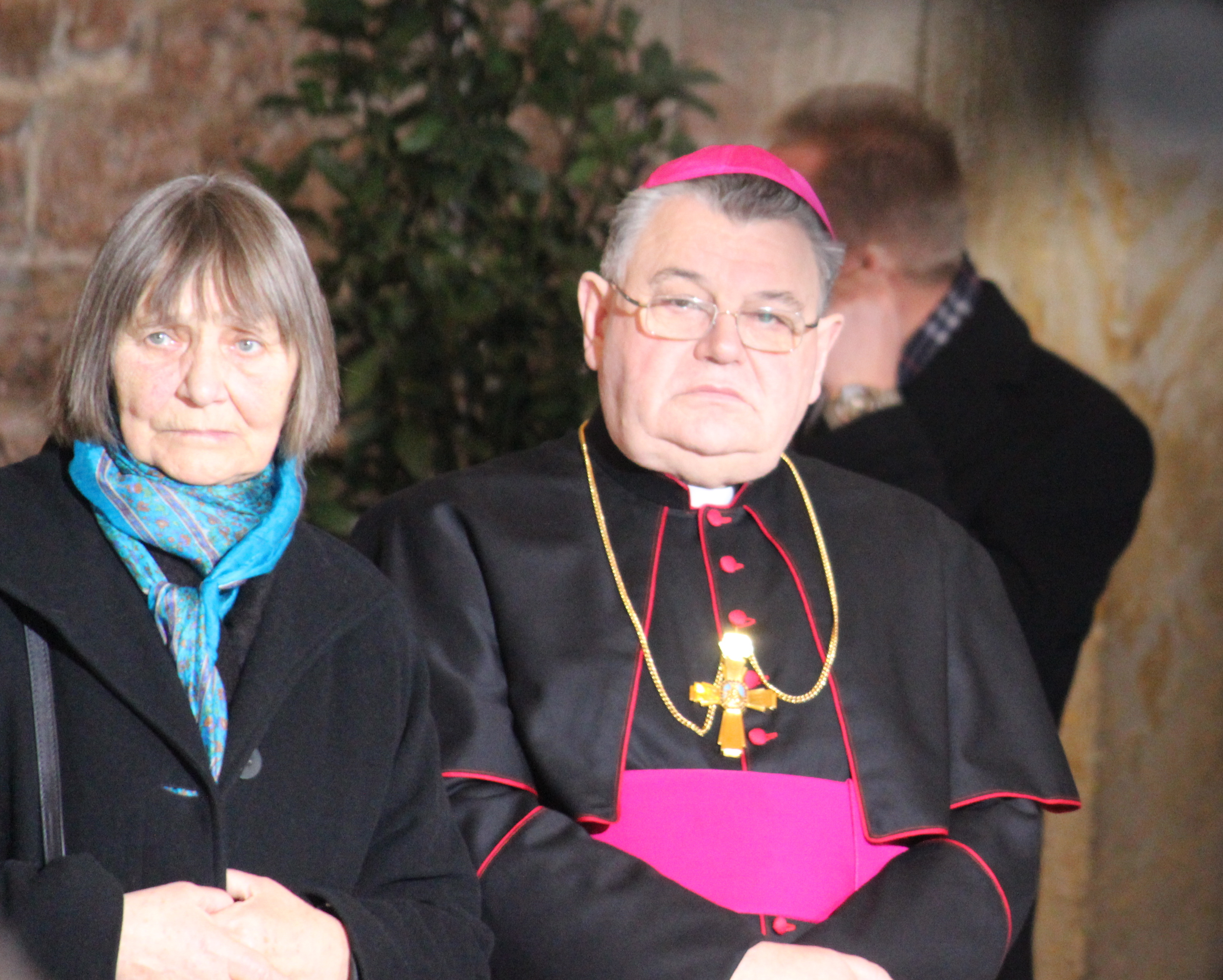 Ve středu 21. 12. 2011 byla rakev s ostatky Václava Havla přemístěna z Pražské křižovatky do Vladislavského sálu Pražského hradu. This photograph was taken with a DSLR from WMCZ's Camera grant.